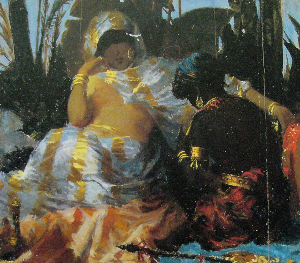 Olio su tela dell'artista italiano Nicola Savoldi (1864-1952).